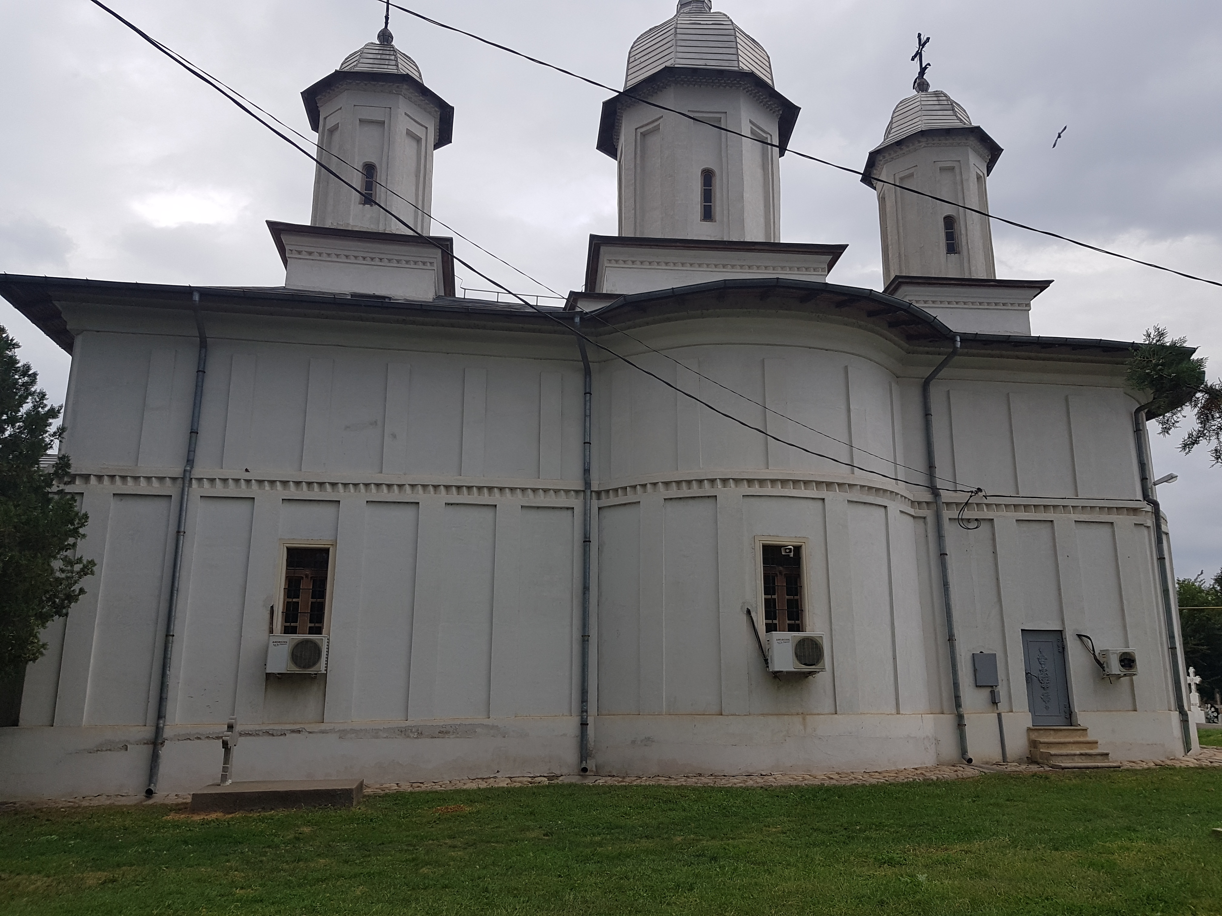 Biserica „Sfânta Cruce” 01